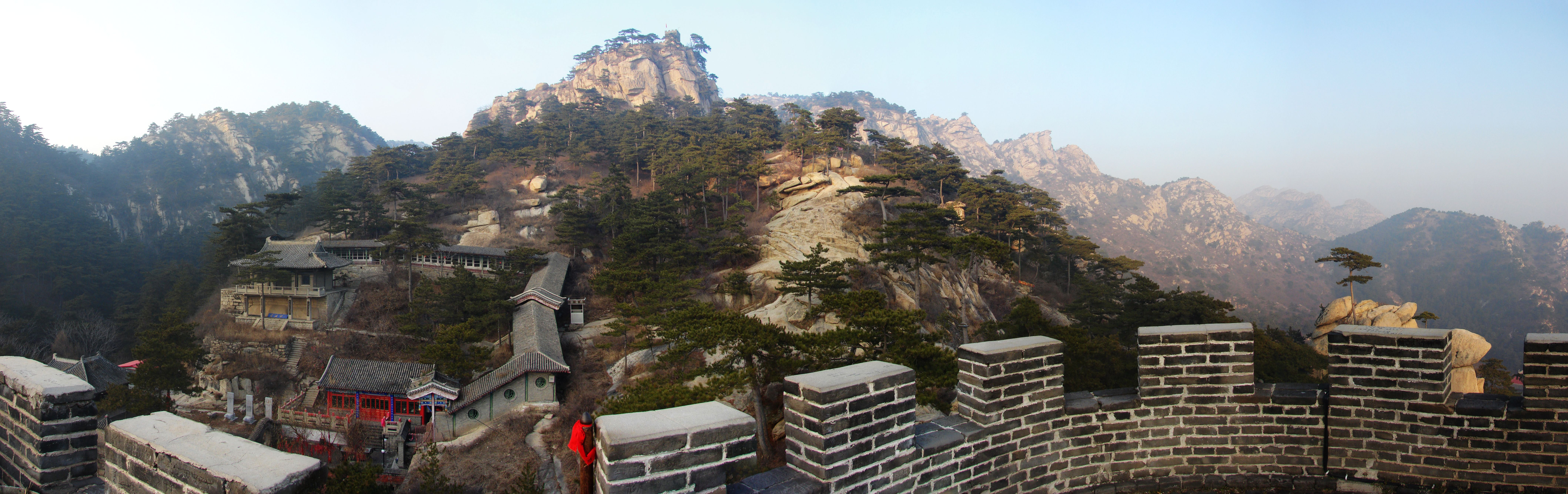 医巫闾山大朝阳景区，位于北镇市市区以西。